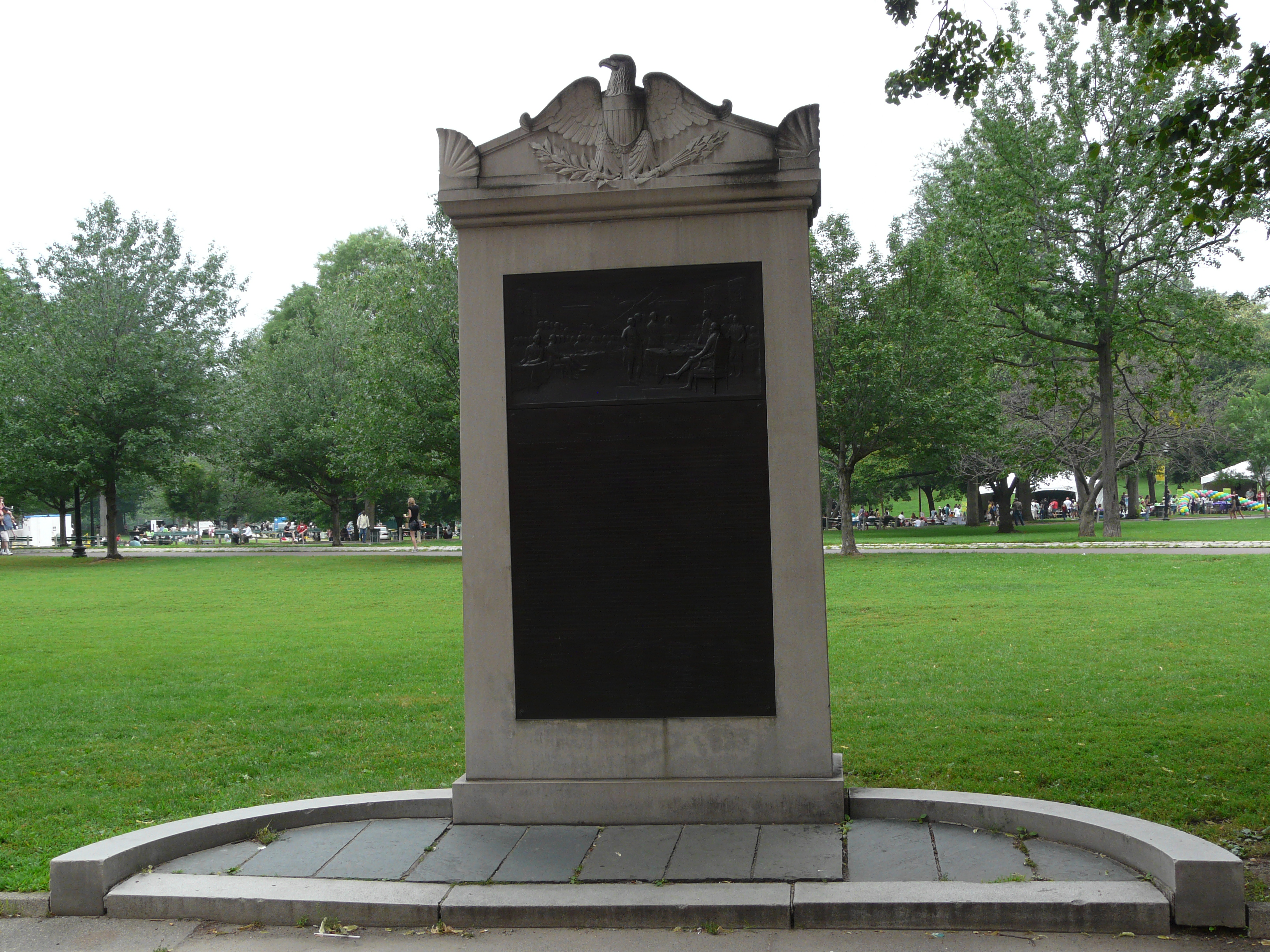 Boston